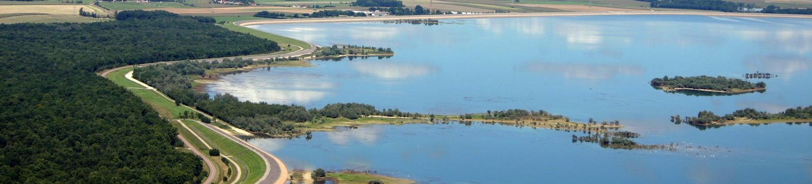 Lac du Temple (Aube, France)